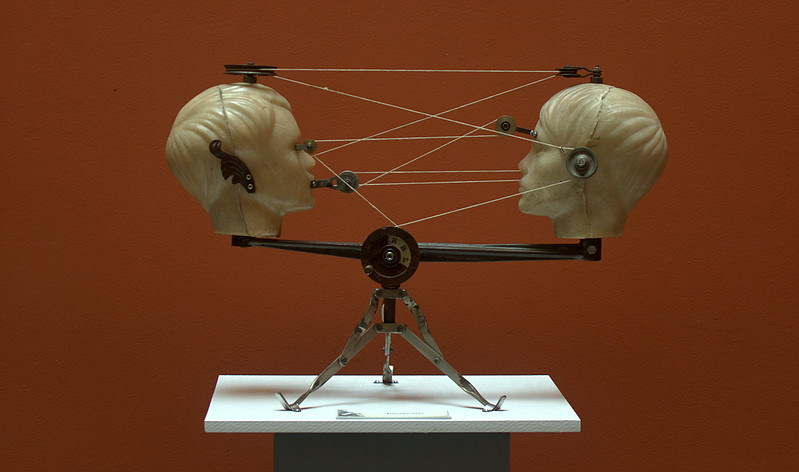 Dzieło Roberta Lenarda-Bachamanna z cyklu "Machinobolizmy"